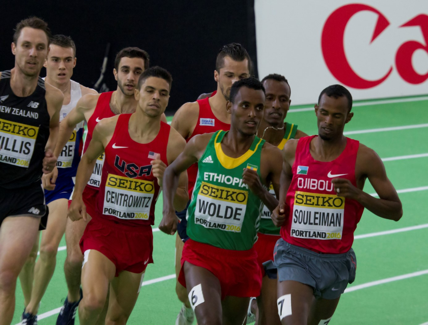 5145 finale 1500m